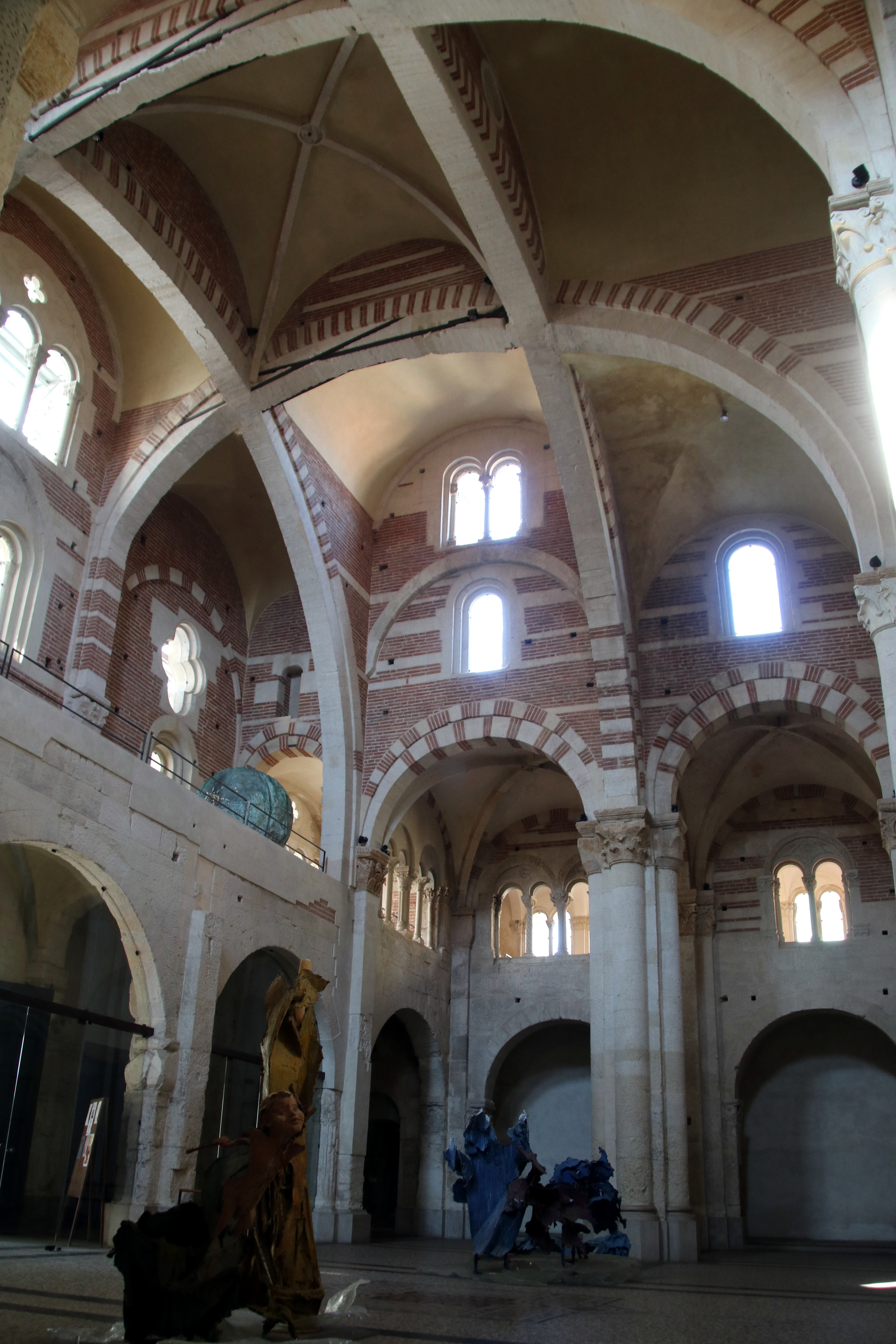 duomo di Sant'Evasio This is a photo of a monument which is part of cultural heritage of Italy.